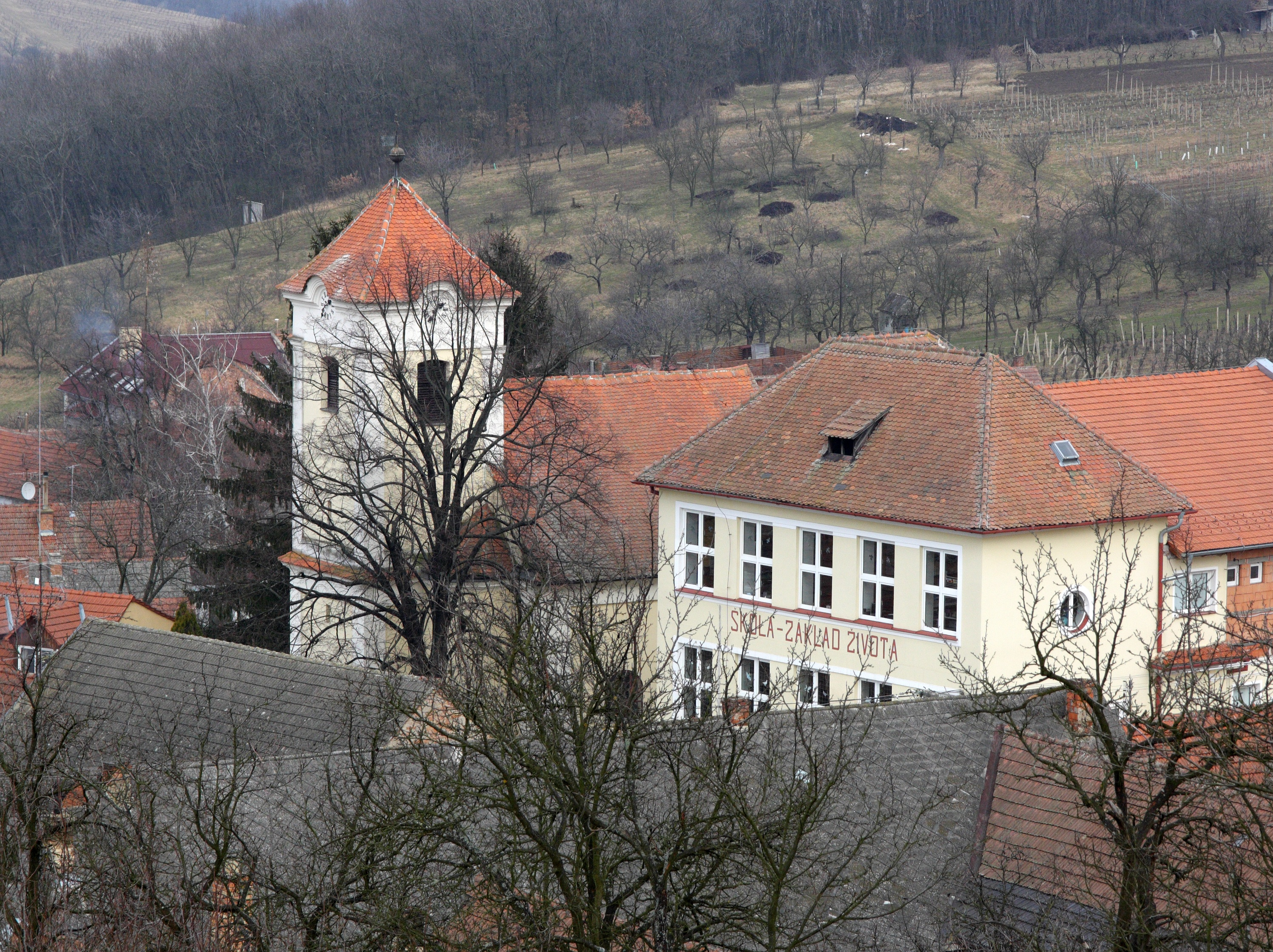 Němčičky (okres Břeclav) - škola a kostel.